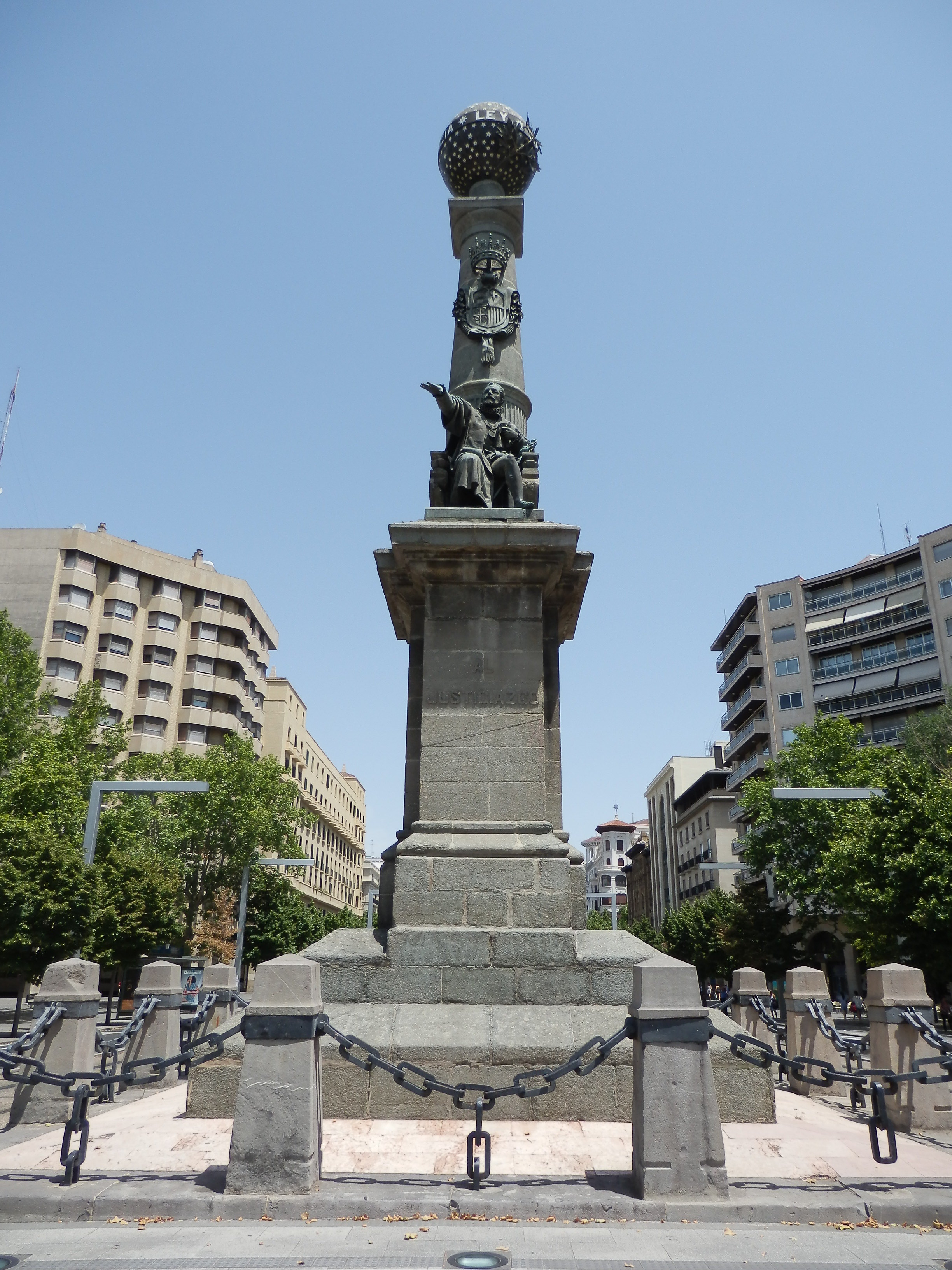 Monumento al Justiciazgo. Estatua de Don Juan V de Lanuza, Justicia Mayor de Aragón ajusticiado en 1591 por orden de Felipe II